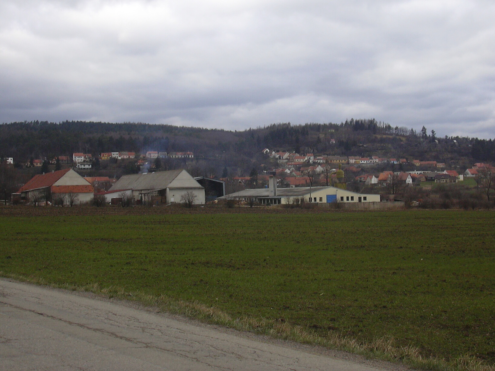 Celkový pohled na Luleč (Vyškov- Czech republic)